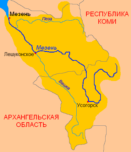 Схема бассейна реки Мезень